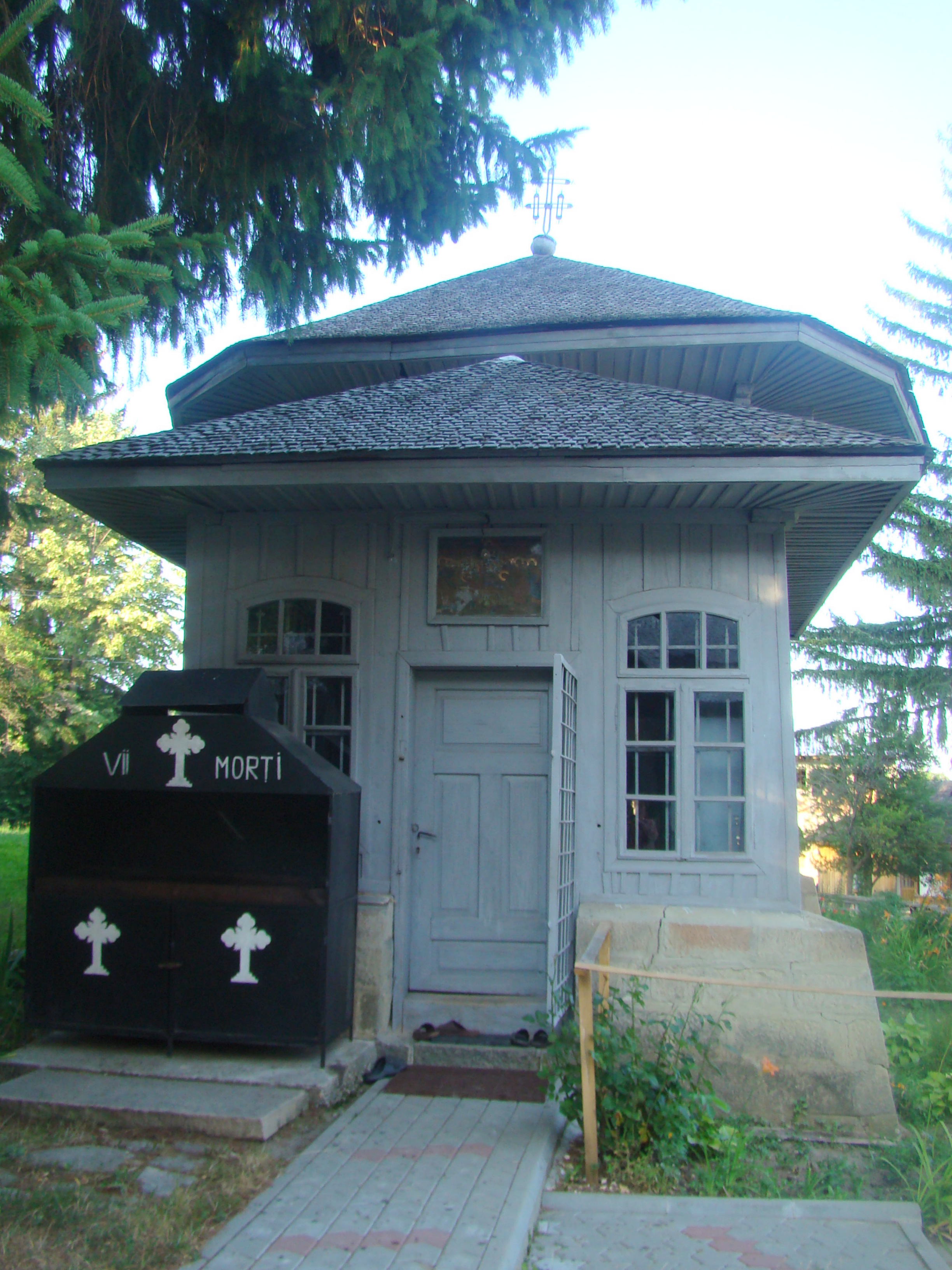 Schitul Valea Neagră, Vrancea